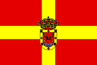 Bandera de Los Santos de la Humosa, en Madrid (España)